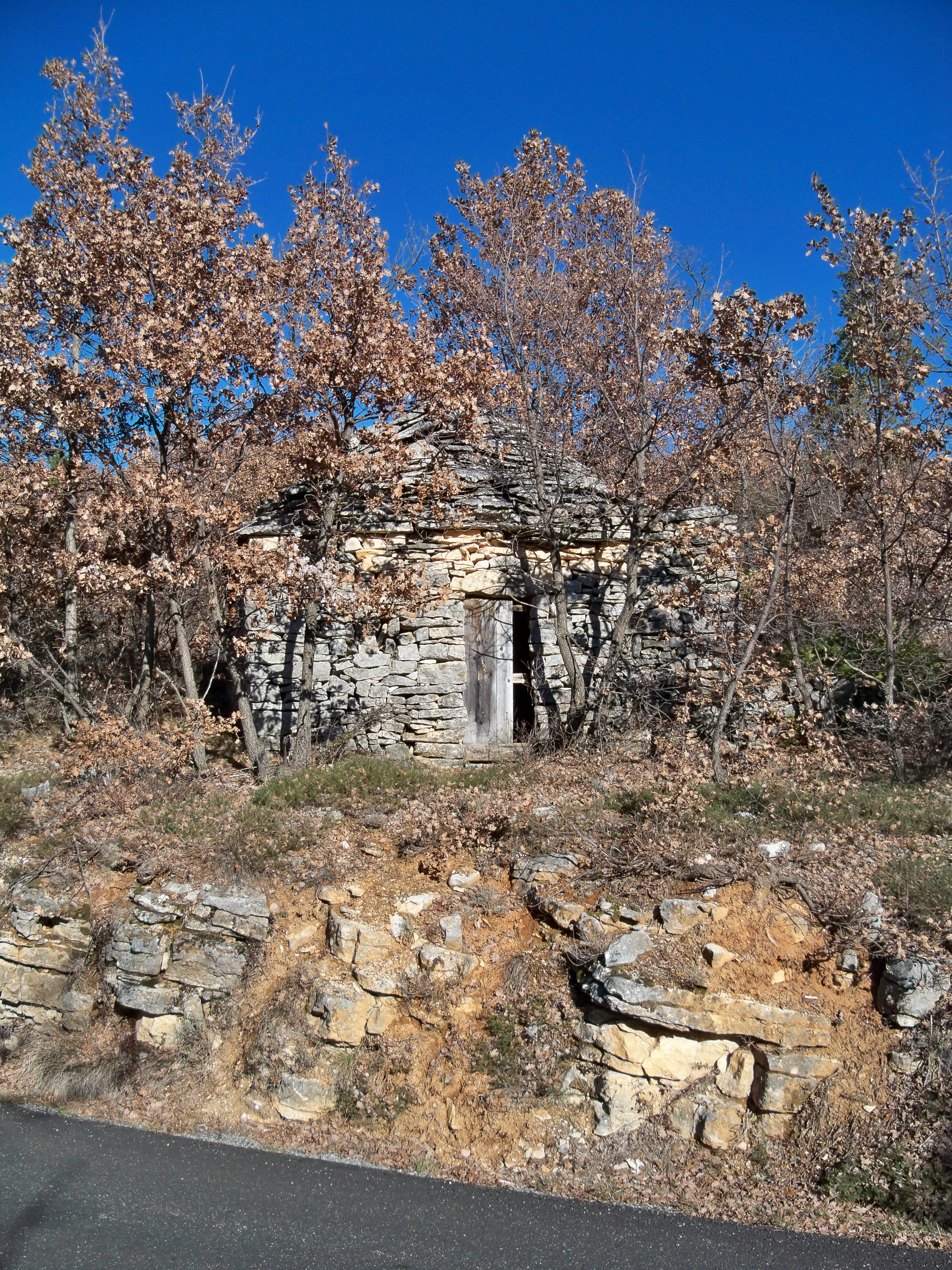 Cabanon enpierres sèches près de Lardiers (04), France